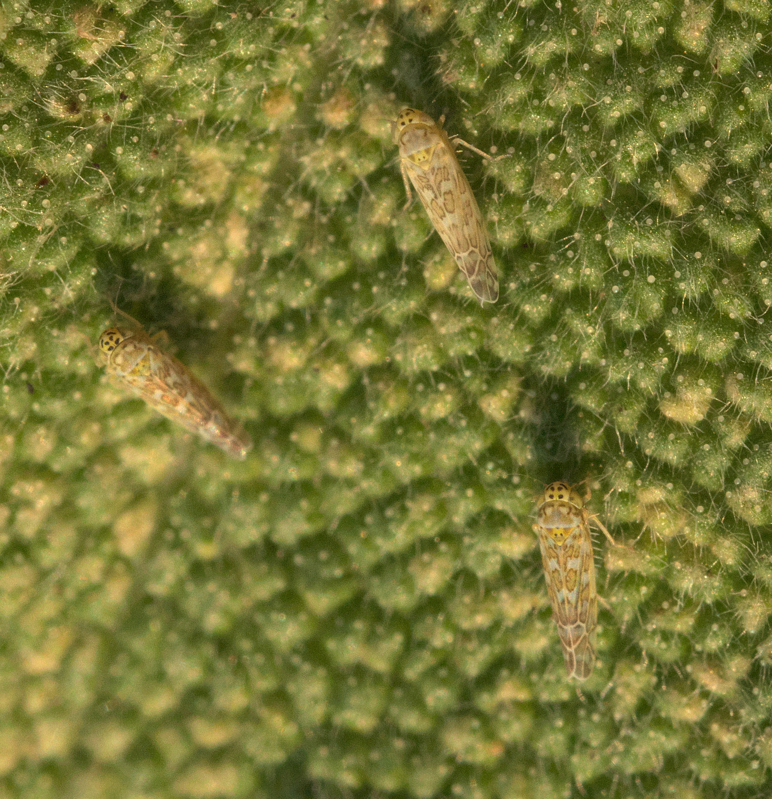 Eupteryx decemnotata, Ligurian Leafhopper, Size: 2.6 mm, ID Confidence: 88